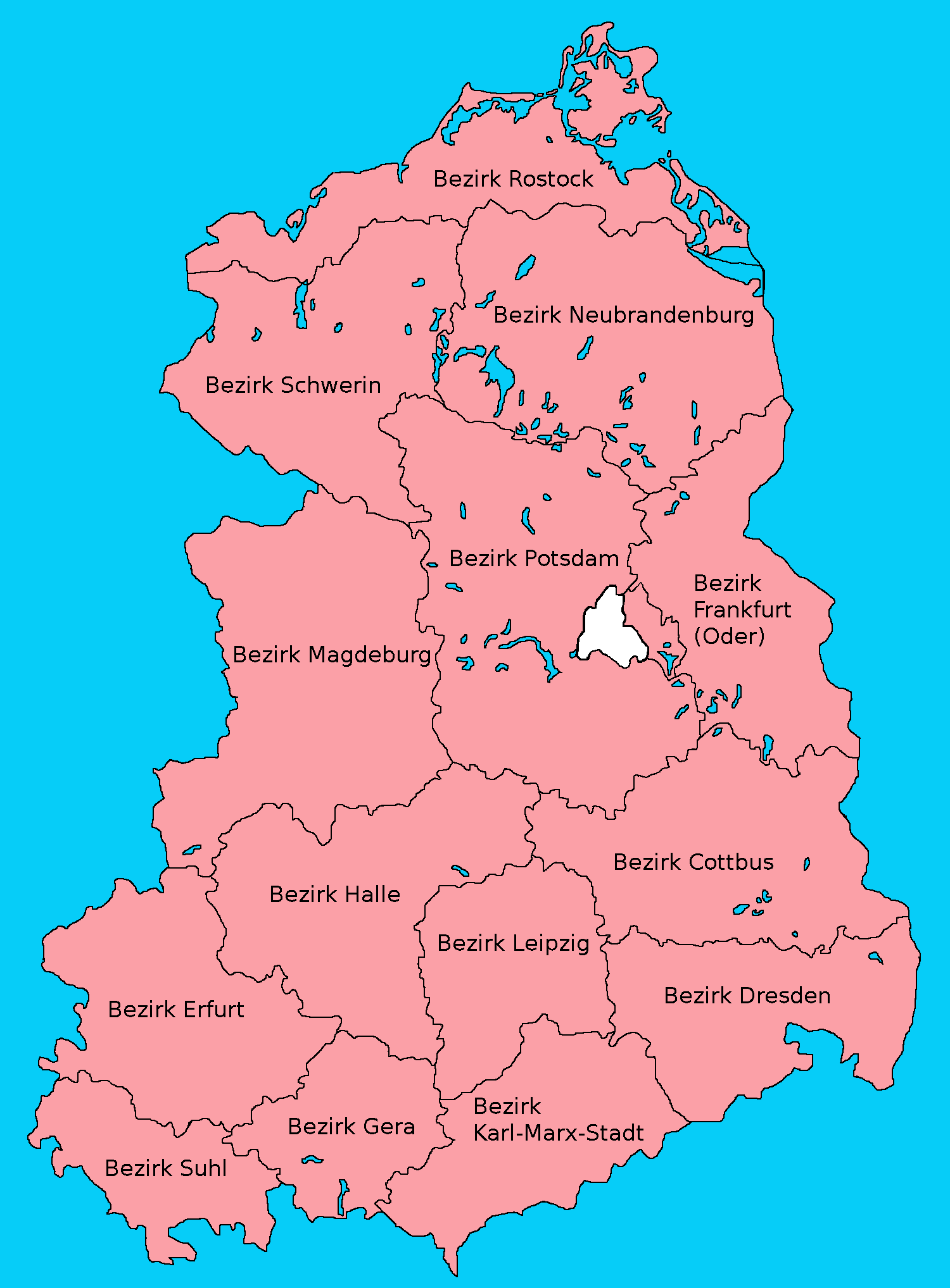 Karte Verwaltungsgliederung der DDR, Kartografie: Acf 1972 (Tuschezeichnung auf Folie); digitale Nachbearbeitung: Acf 2004; Public Domain